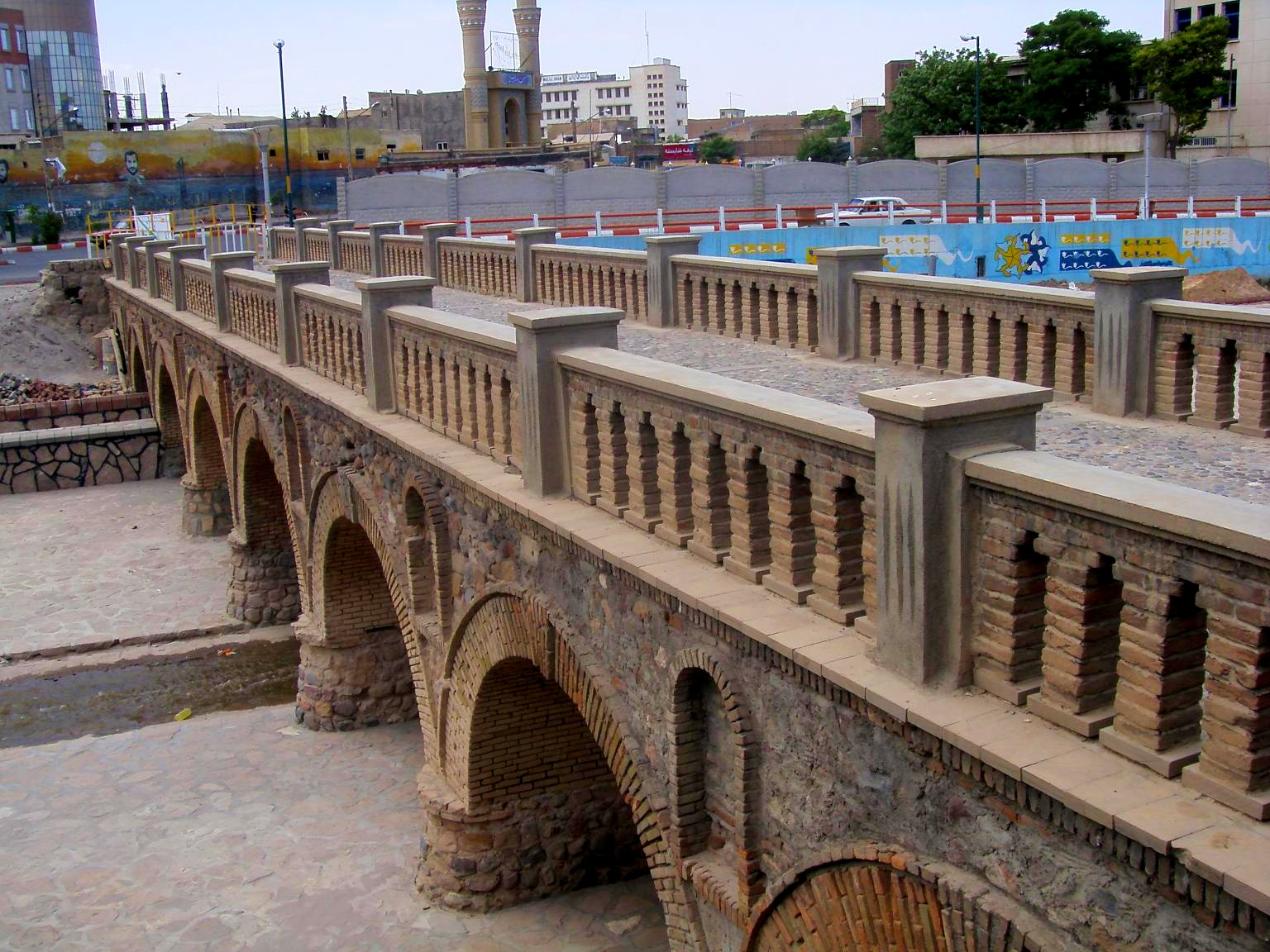 Ghari Bridge, Tabriz, Iran